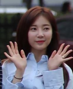 뮤직뱅크 출근길